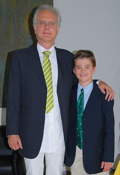 Moderator Harald Schmidt (Harald Schmidt Show) mit Talkgast Patrick Mölleken (Pfarrer Braun - Heiliger Birnbaum)